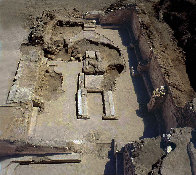 Sinagoga de la Judería de Lorca